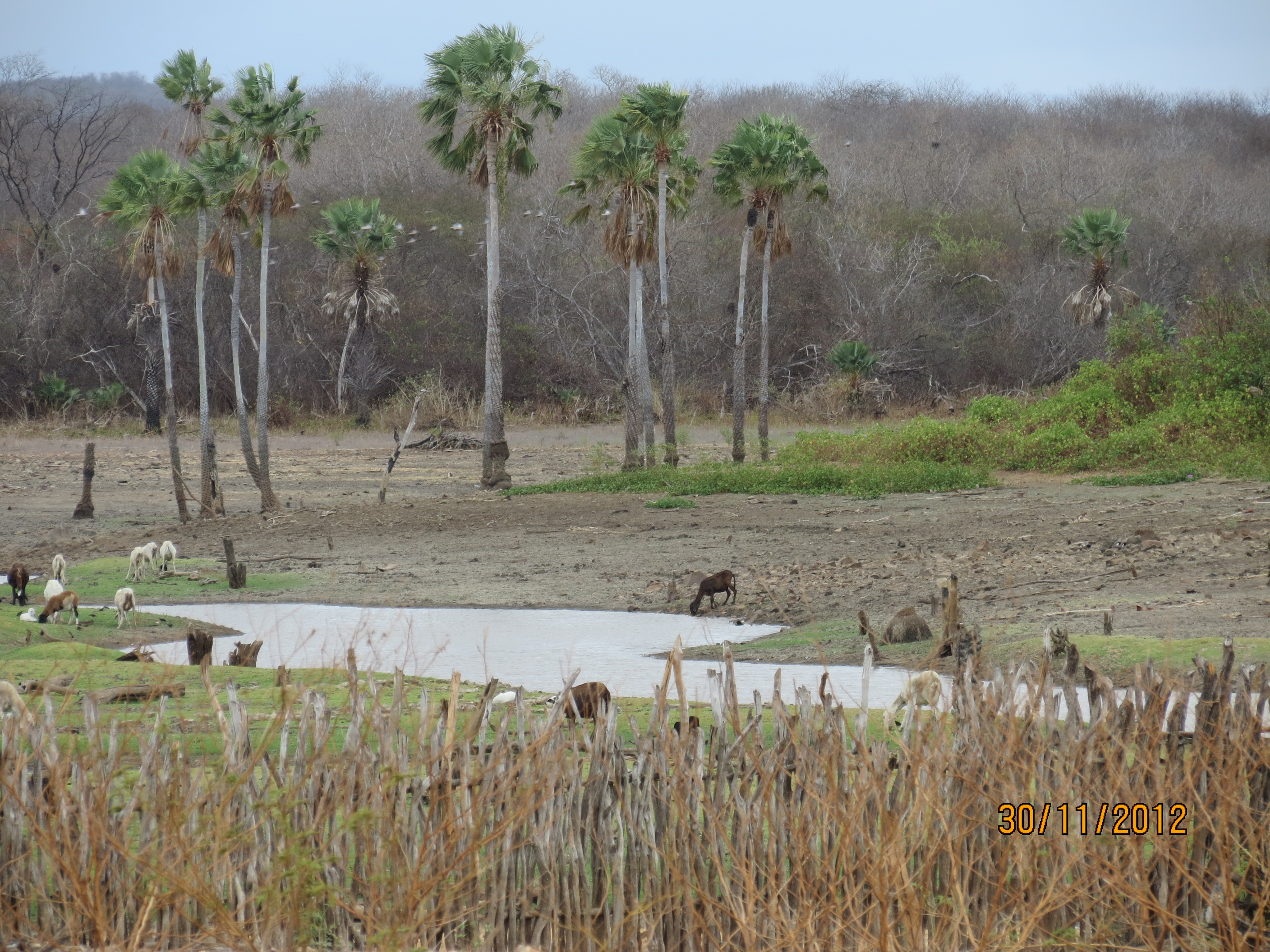 O que ainda restou de água - Cariré - CE.